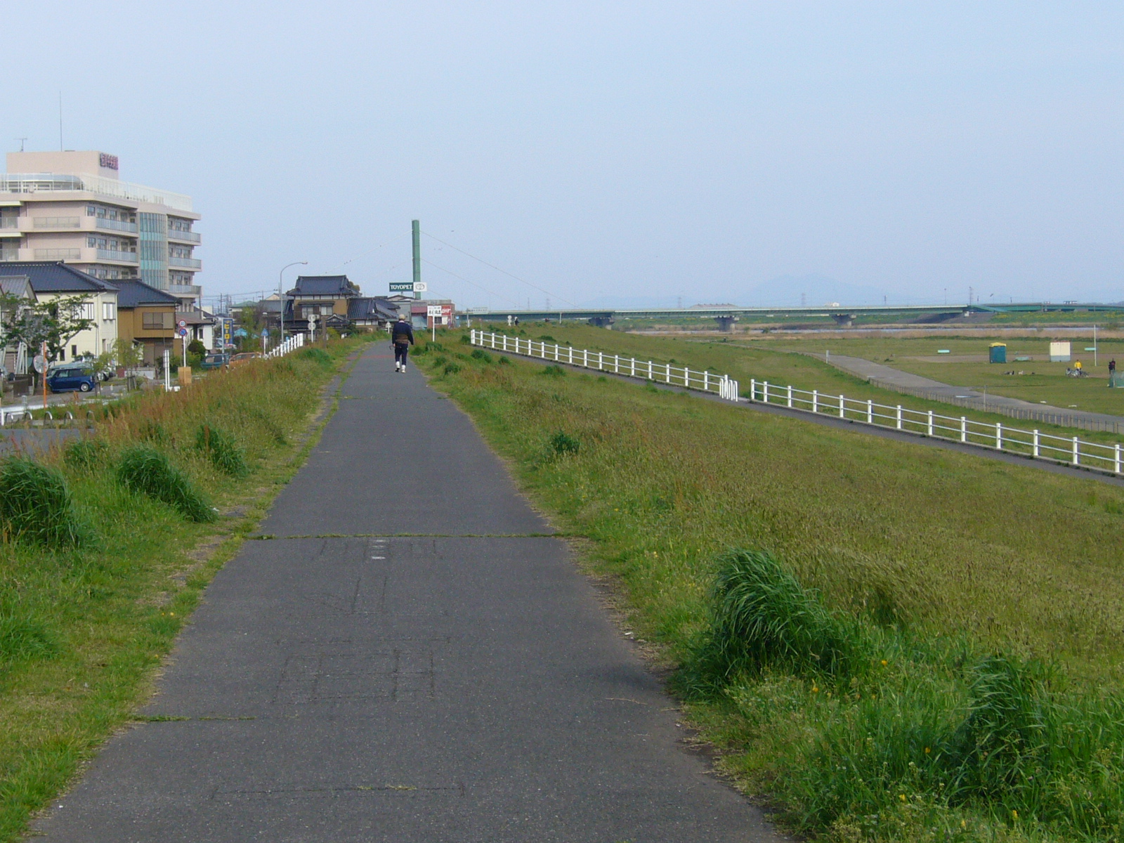 Ootone cycling road, sawara, katori-city, japan